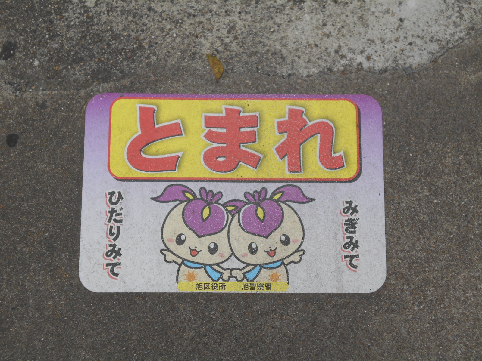 しょうぶちゃん